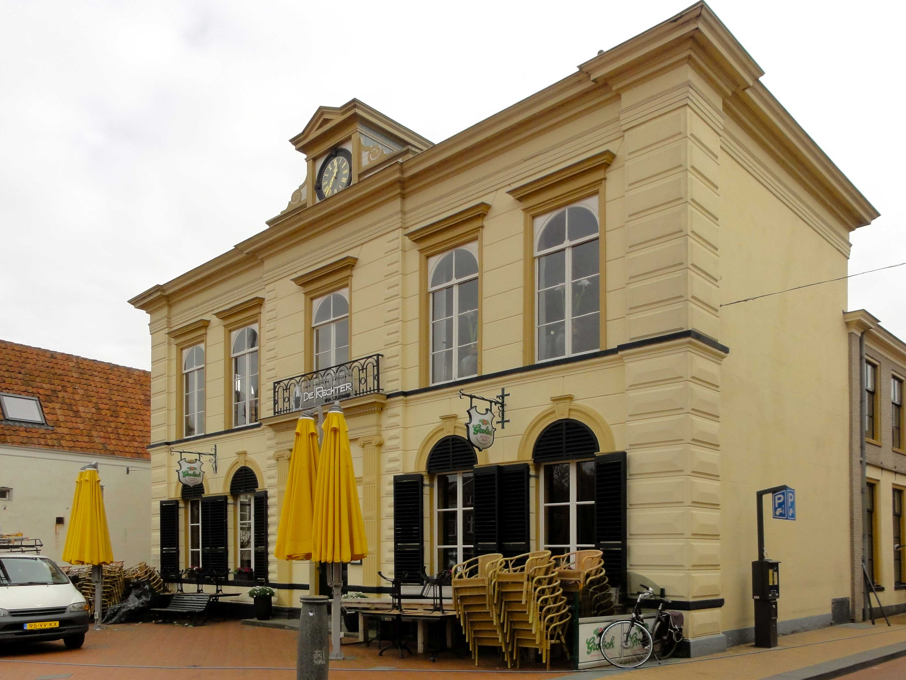 Markt 72 te Steenwijk (rijksmonument)